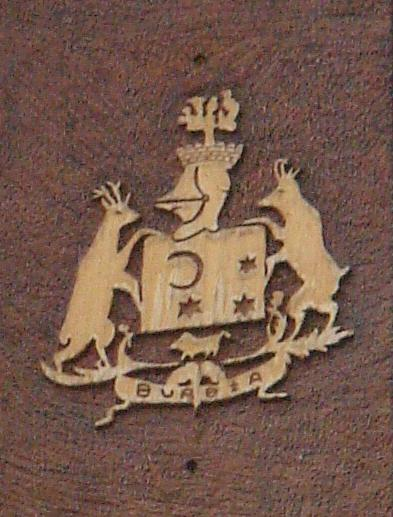 Escudo de Burbia, en el municipio de Vega de Espinareda (León, España)